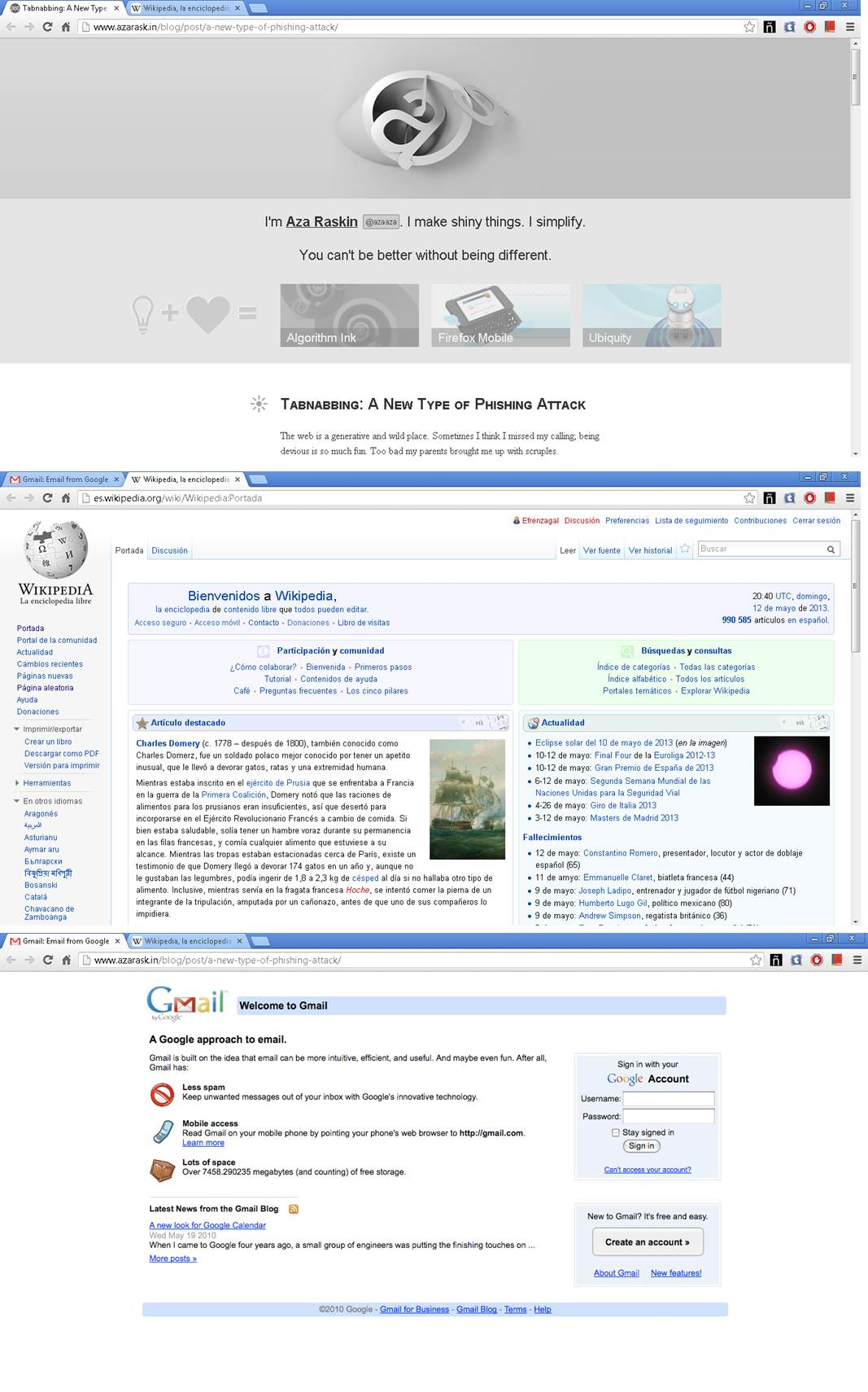 Ejemplo en tres pasos de como funciona el Tabnabbing, dentro del sitio web de Aza Raskin.